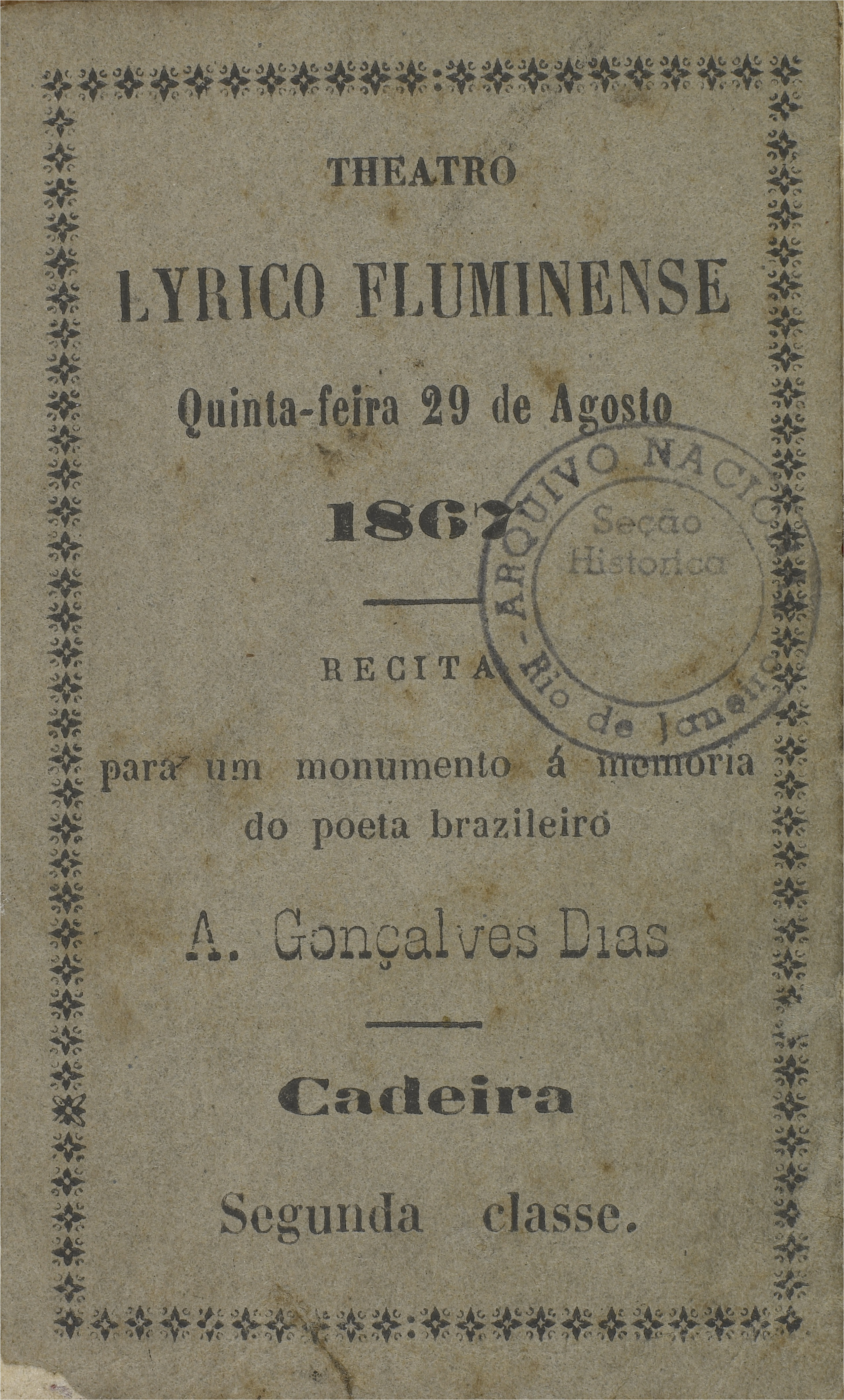 Entrada para o Teatro Lyrico Fluminense. Fundo: Itens Documentais.